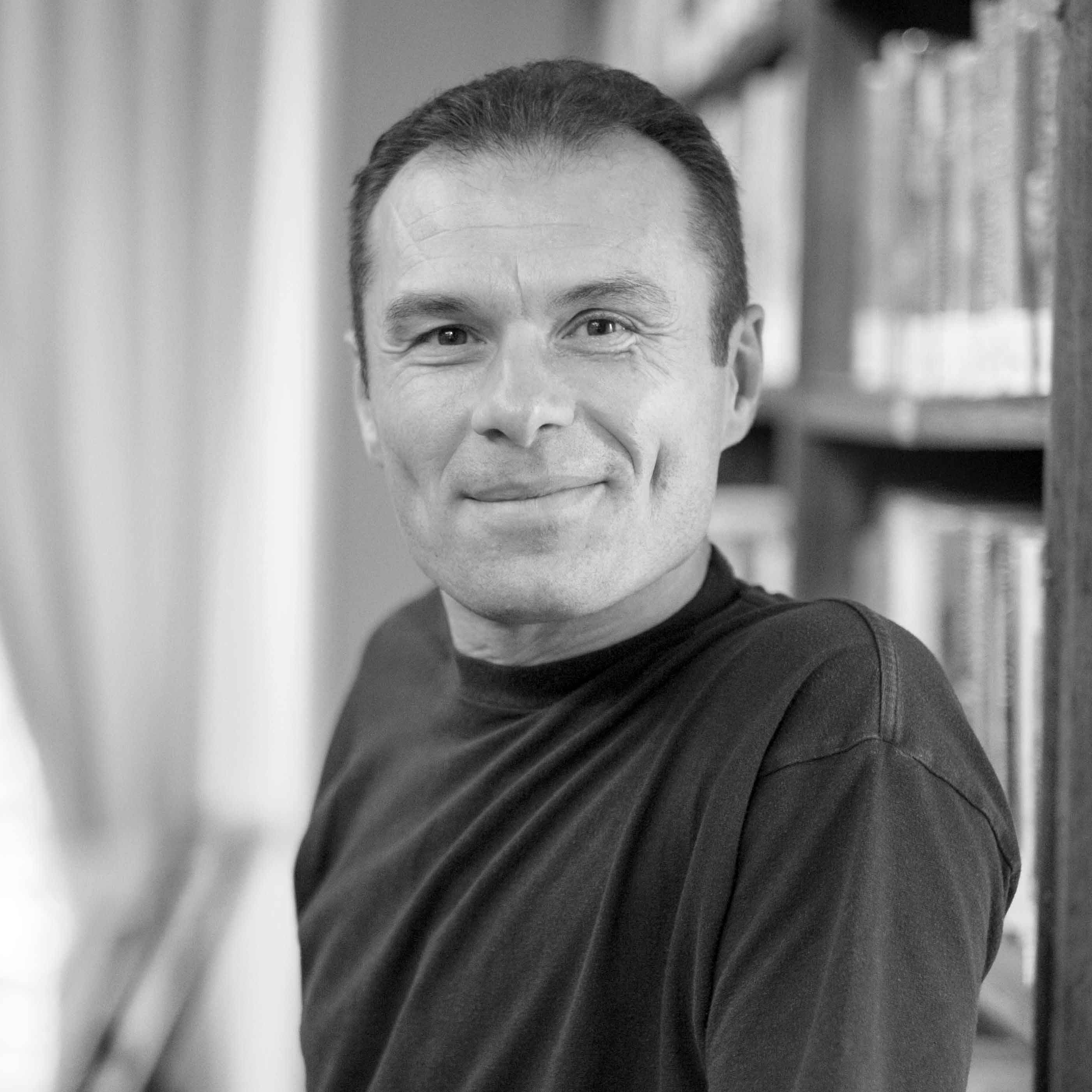 Maurizio Gatti en 2015